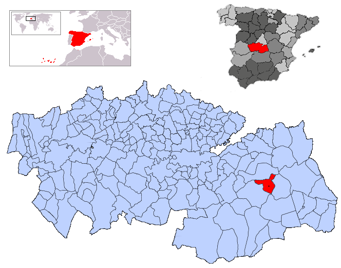 El Romeral en la provincia de Toledo